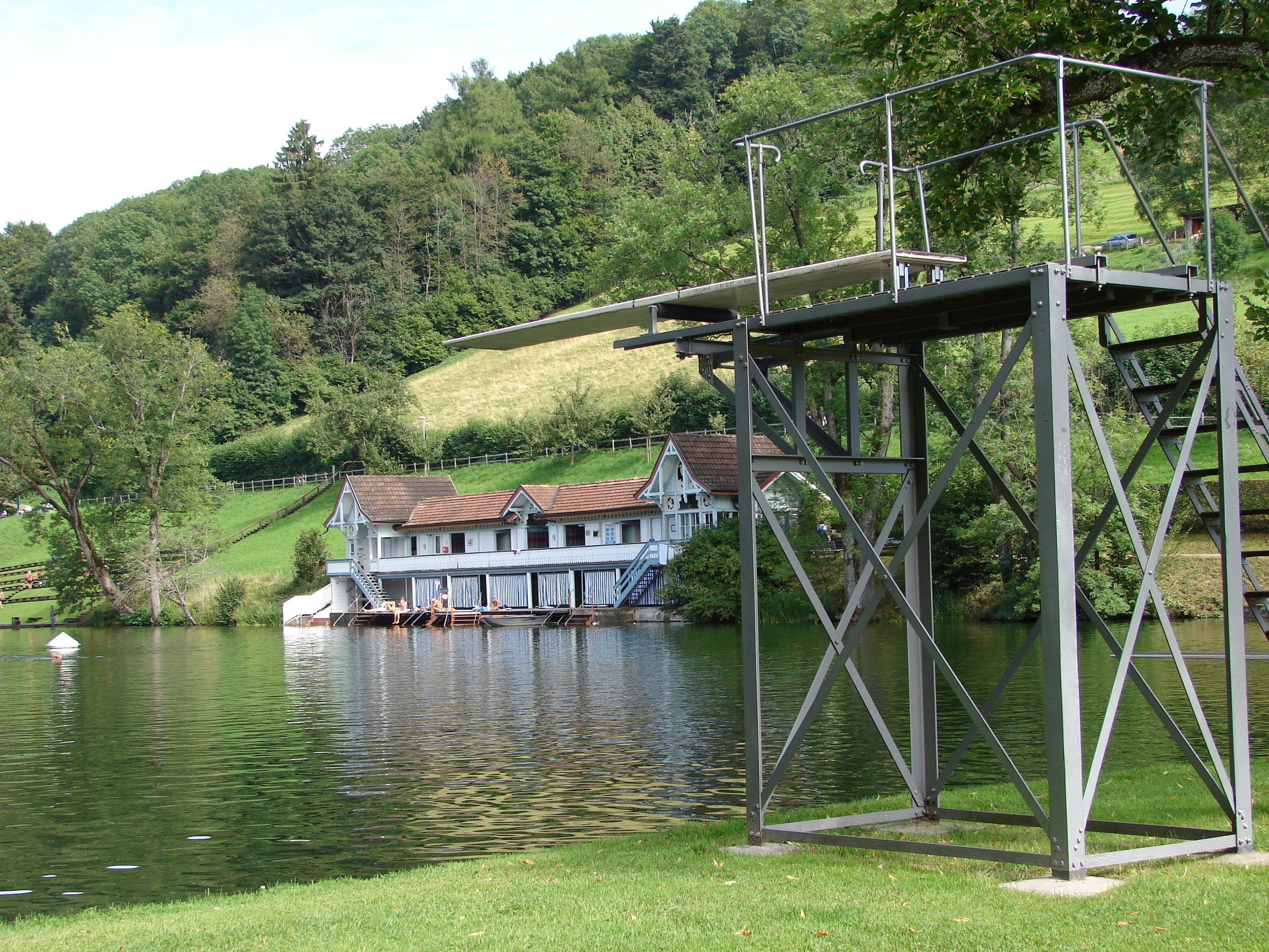 St. Gallen, Volksbad, Manneweier